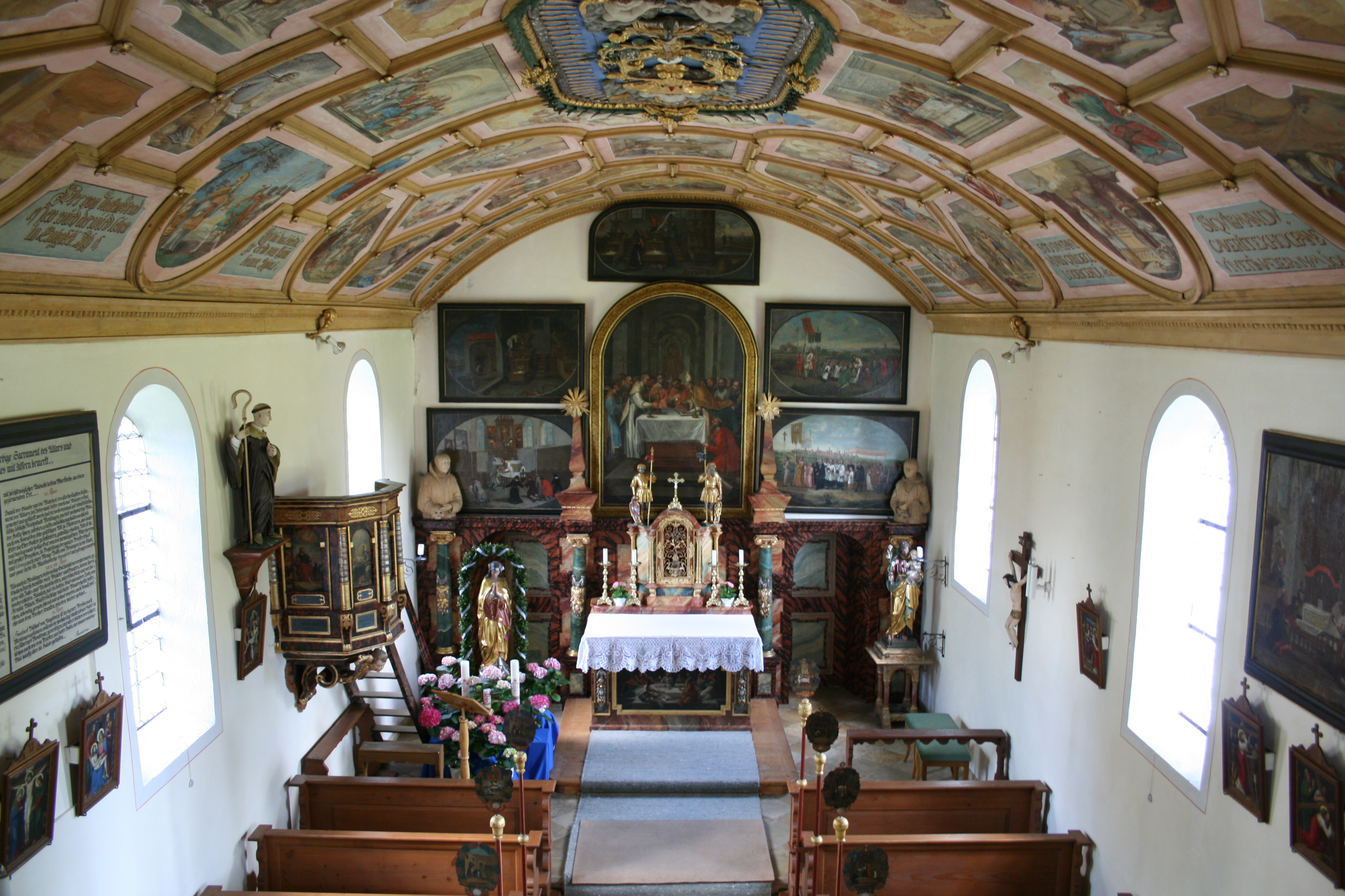 Schiff der Riedkapelle in Benningen